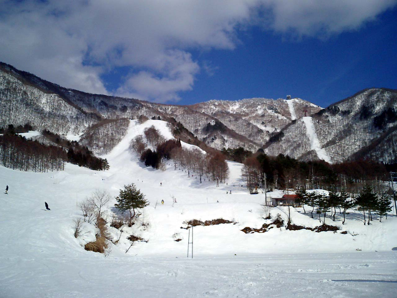 竜王スキーパーク庵